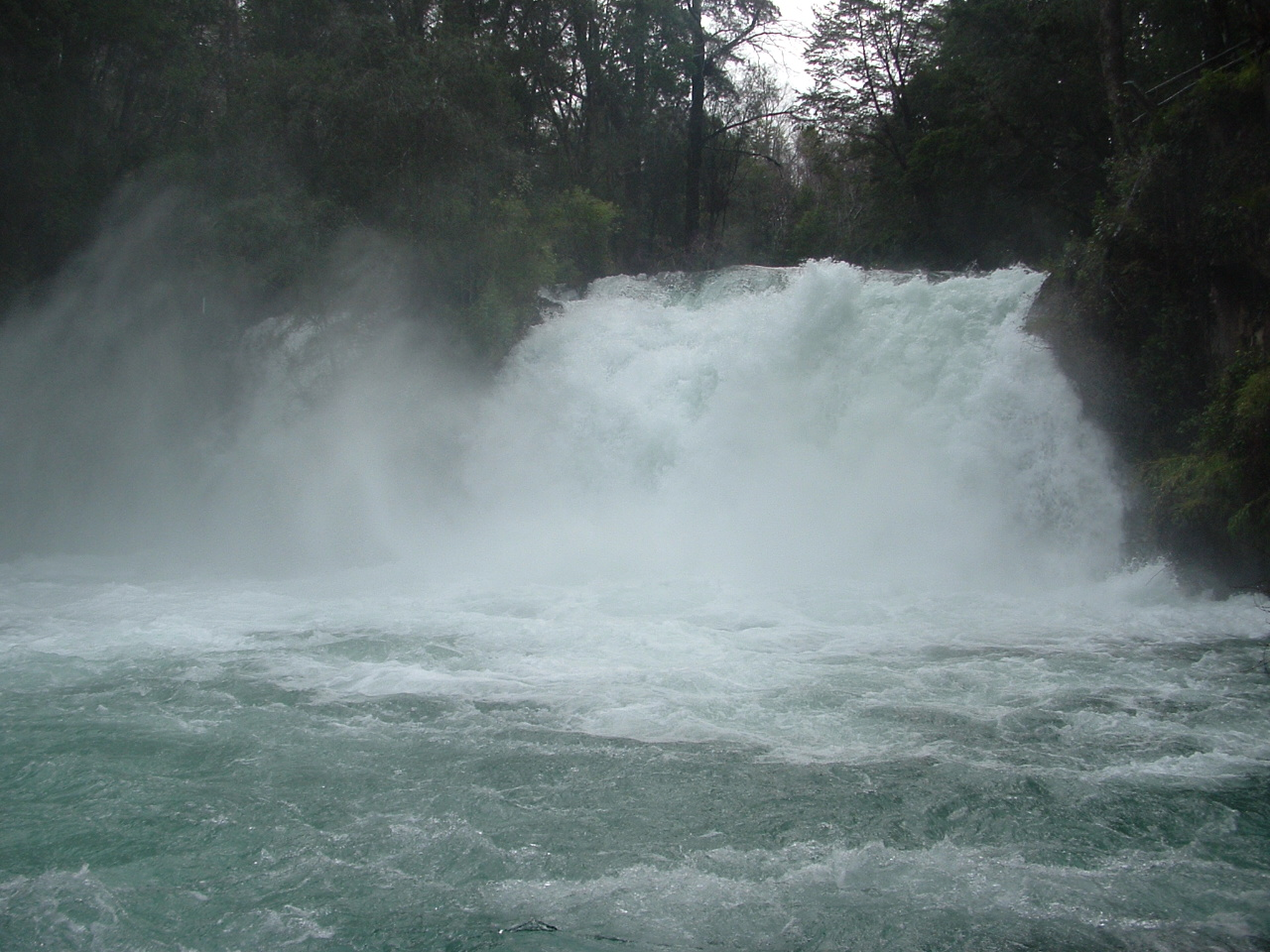 Saltos del Río Petrohué